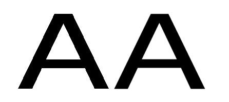 Comparaison avec et sans antialiasing